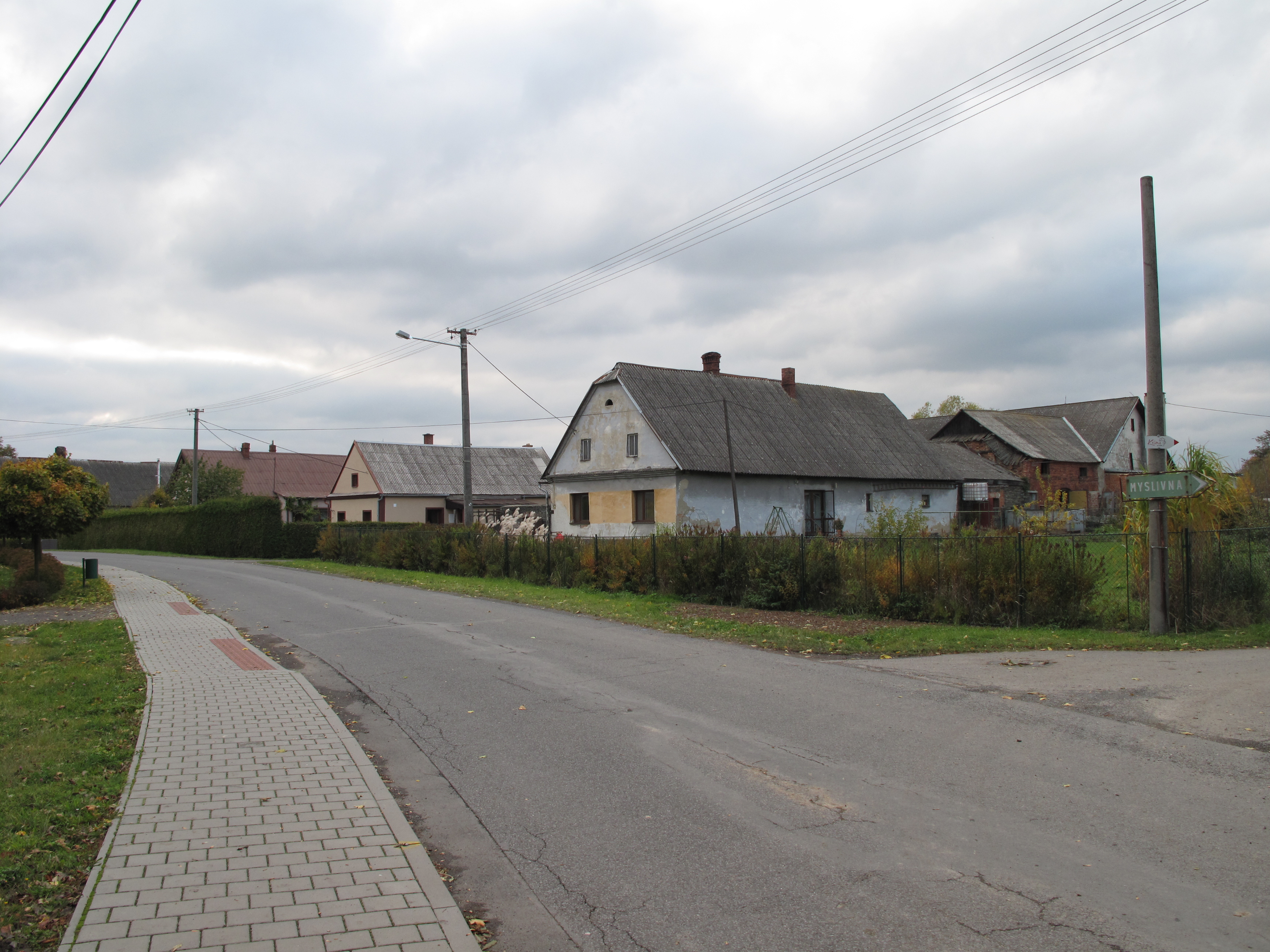 Čermná ve Slezsku. Okres Opava, Česká republika.